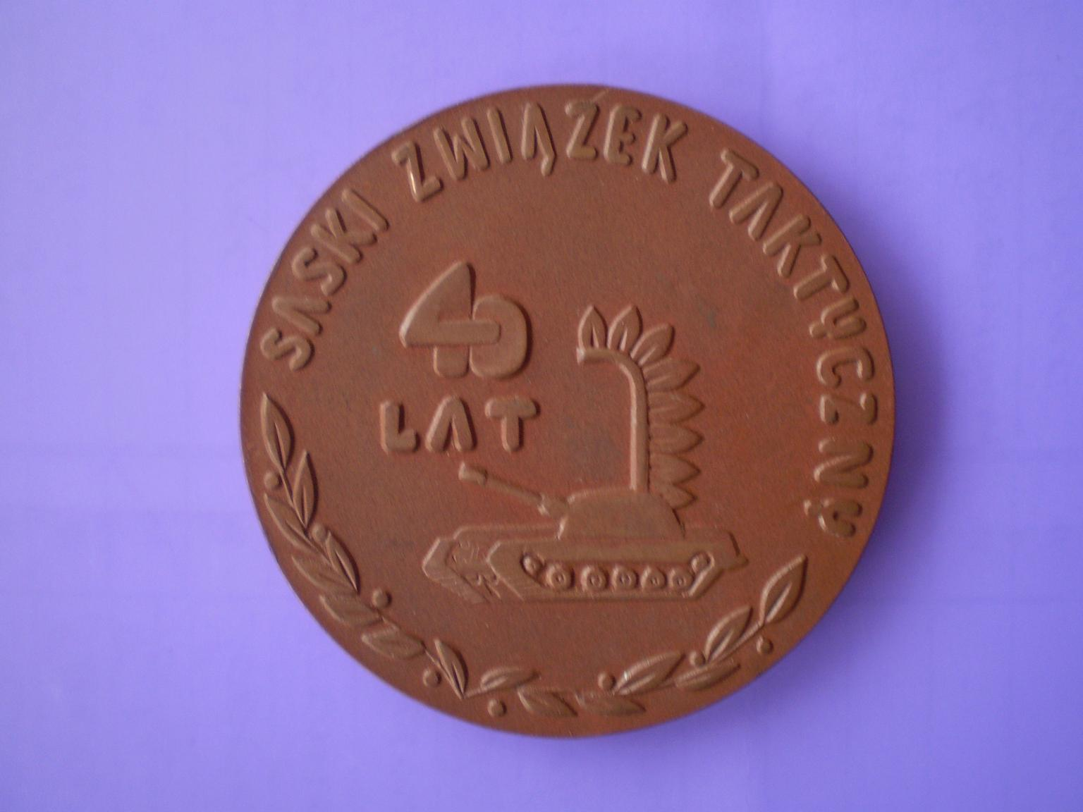 Medal pamiątkowy 2 br z Gubina